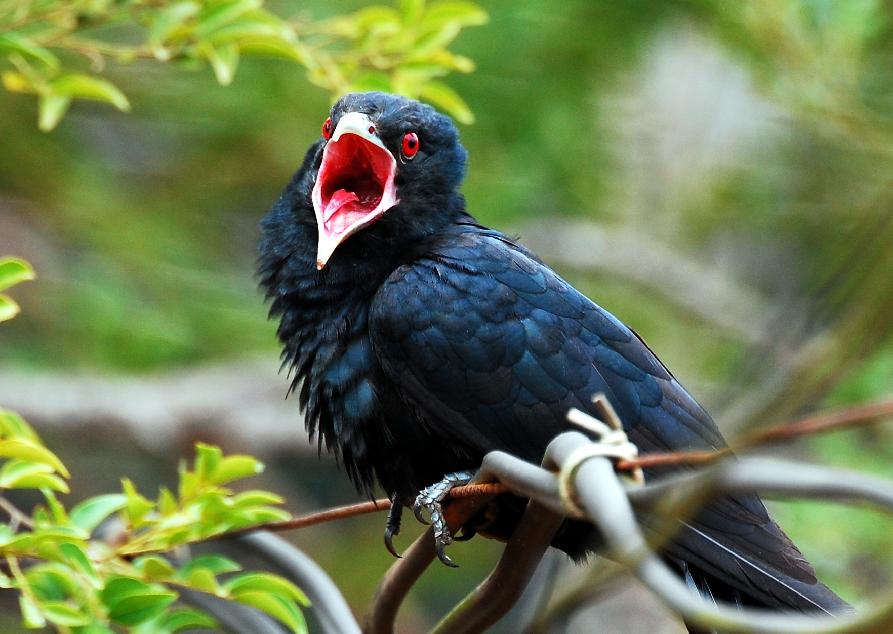 Asian koel Male shot at chalakdudy kerala India